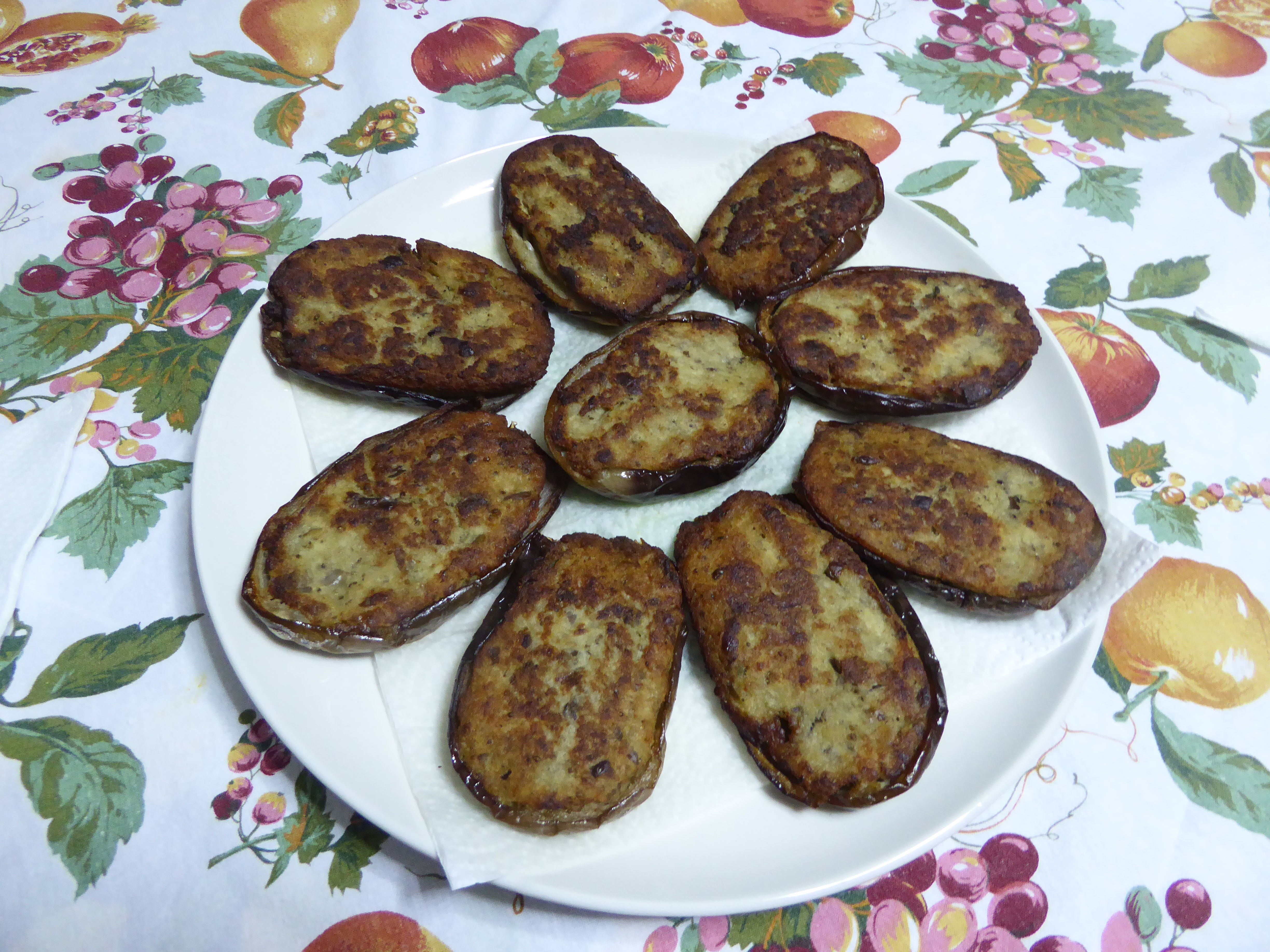 Braciole di melanzane ripiene (agosto 2018)